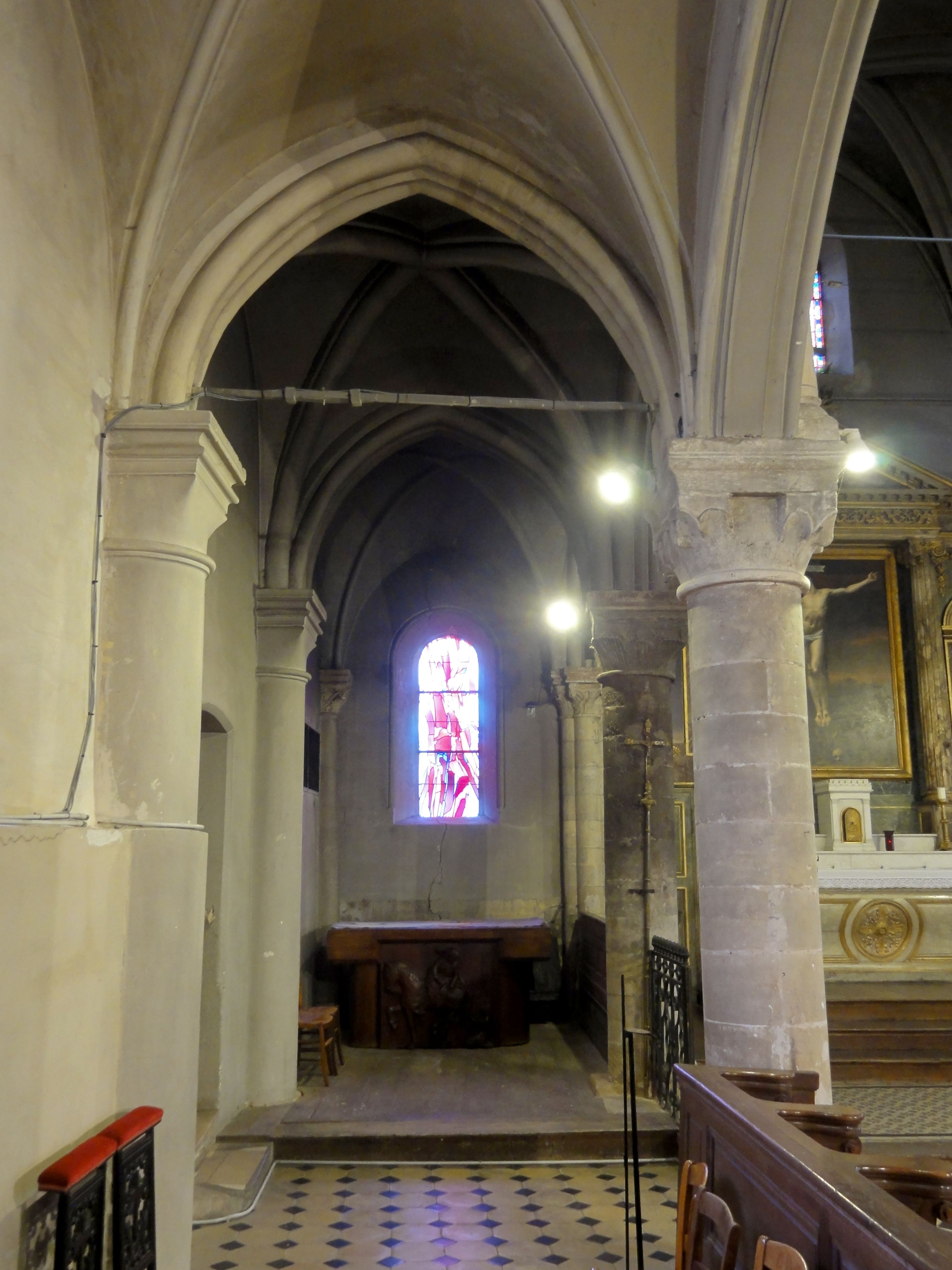 Collatéral nord du chœur, vue vers l'est.